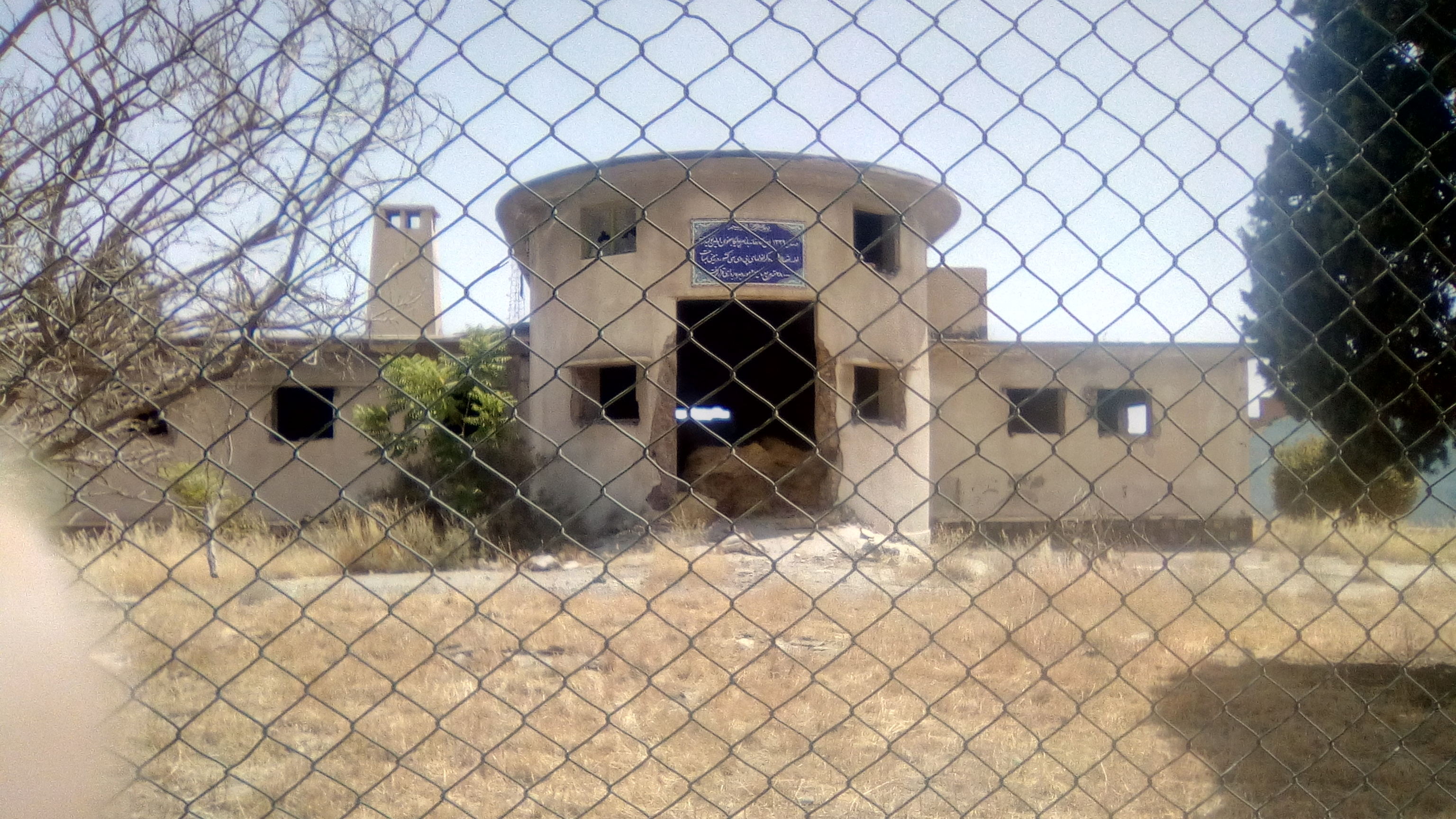 سردر قدیمی ترین کارخانه لوله سازی ایران